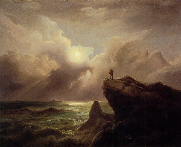 Paisaje marino.